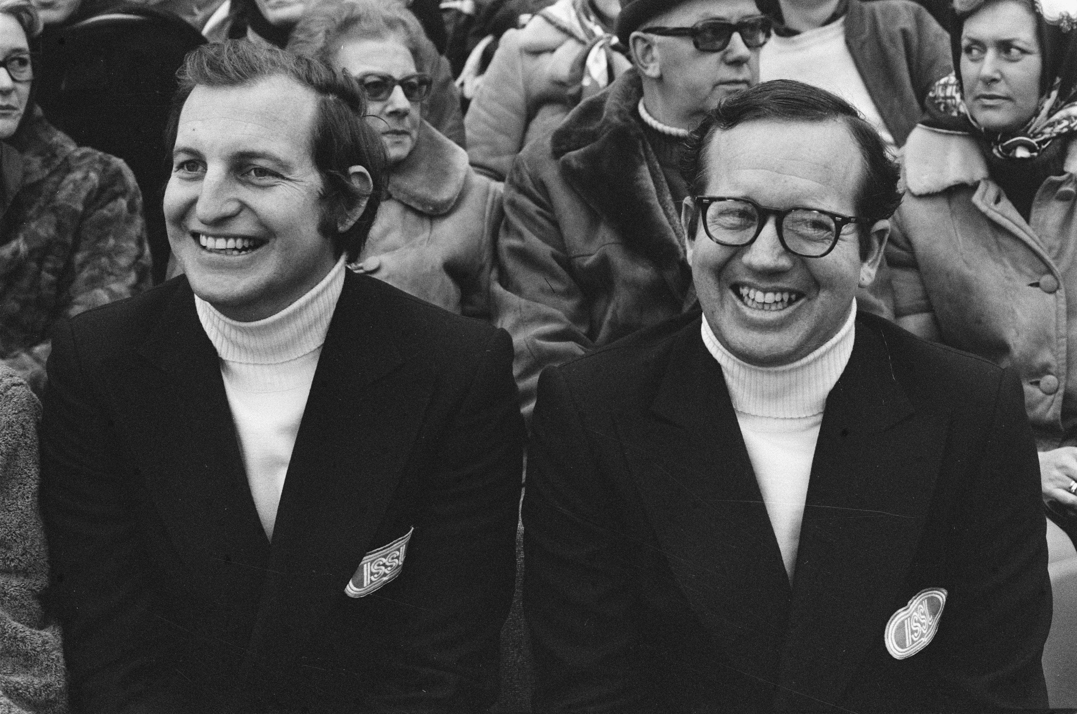 Collectie / Archief : Fotocollectie Anefo Reportage / Serie : [ onbekend ] Beschrijving : Schaatswedstrijden voor eerste ISSL World Cup voor prof op De Uithof in Den Haag , nummer 3 en 4 Morris (l) en Nealy, bestuursleden van ISSL Datum : 6 januari 1973 Locatie : Den Haag, Zuid-Holland Trefwoorden : SCHAATSEN, sport Persoonsnaam : De Uithof, ISSL World Cup Fotograaf : Verhoeff, Bert / Anefo Auteursrechthebbende : Nationaal Archief Materiaalsoort : Negatief (zwart/wit) Nummer archiefinventaris : bekijk toegang 2.24.01.05 Bestanddeelnummer : 926-1416